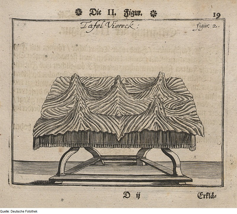 Original image description from the Deutsche Fotothek Gastronomie & Esskultur & Tischsitte & Tisch